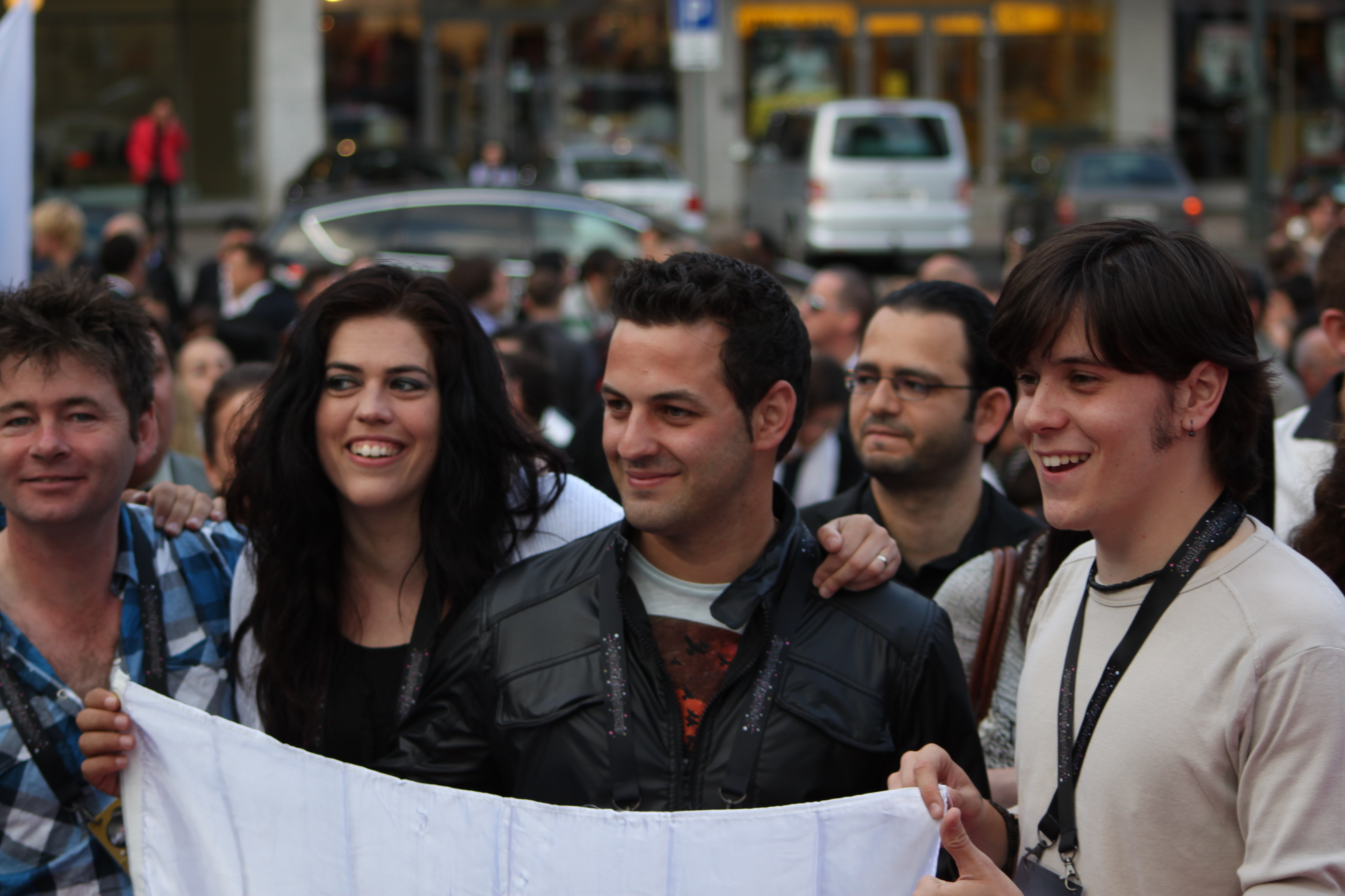 Foto: Vincent Hasselgård, Aktiv I Oslo.no